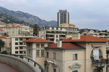 Quartier de Monte-Carlo à Monaco, France